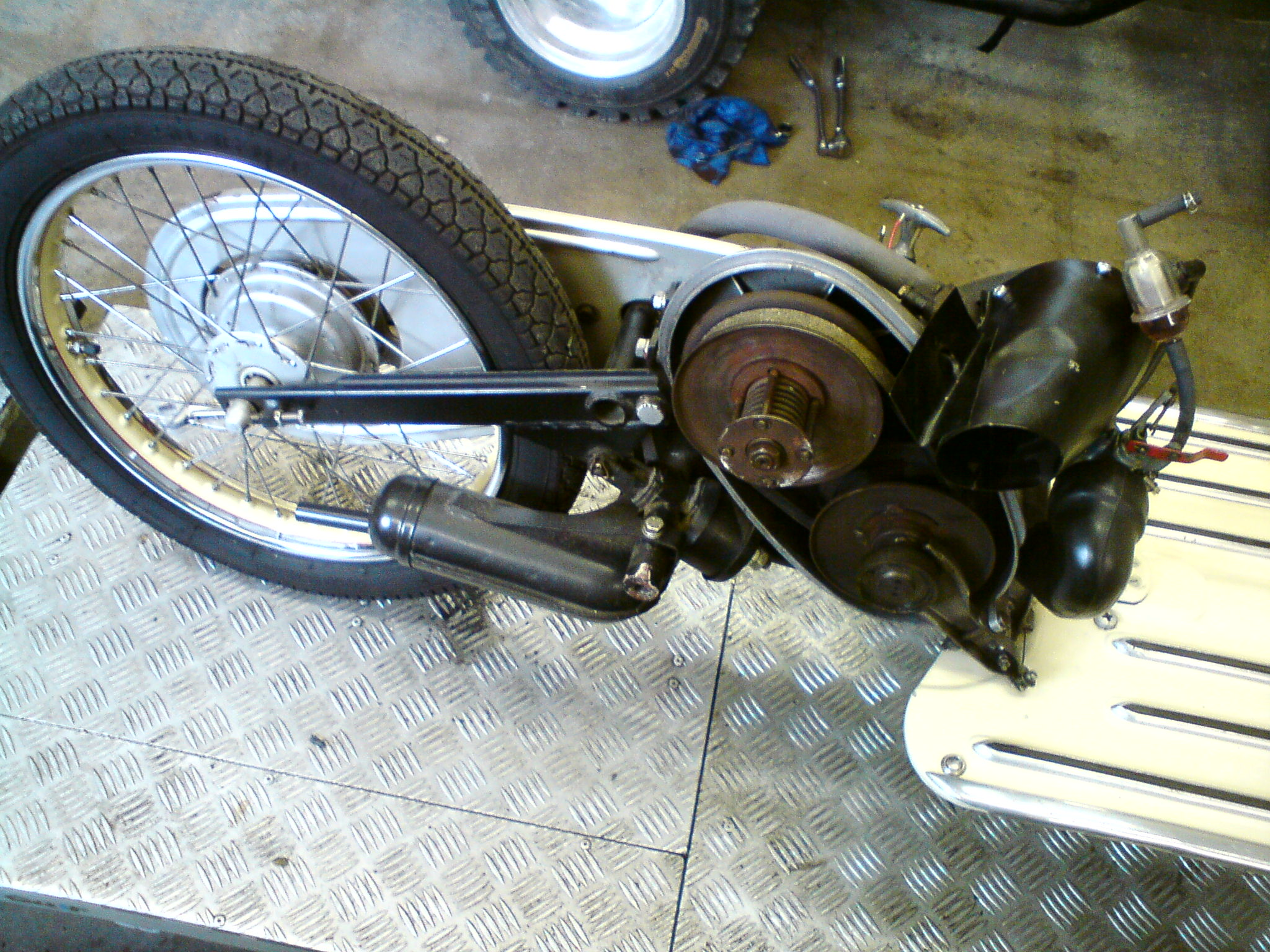 DKW Hobby Luxus von 1955 ohne hintere Verkleidung (Sitzbank)